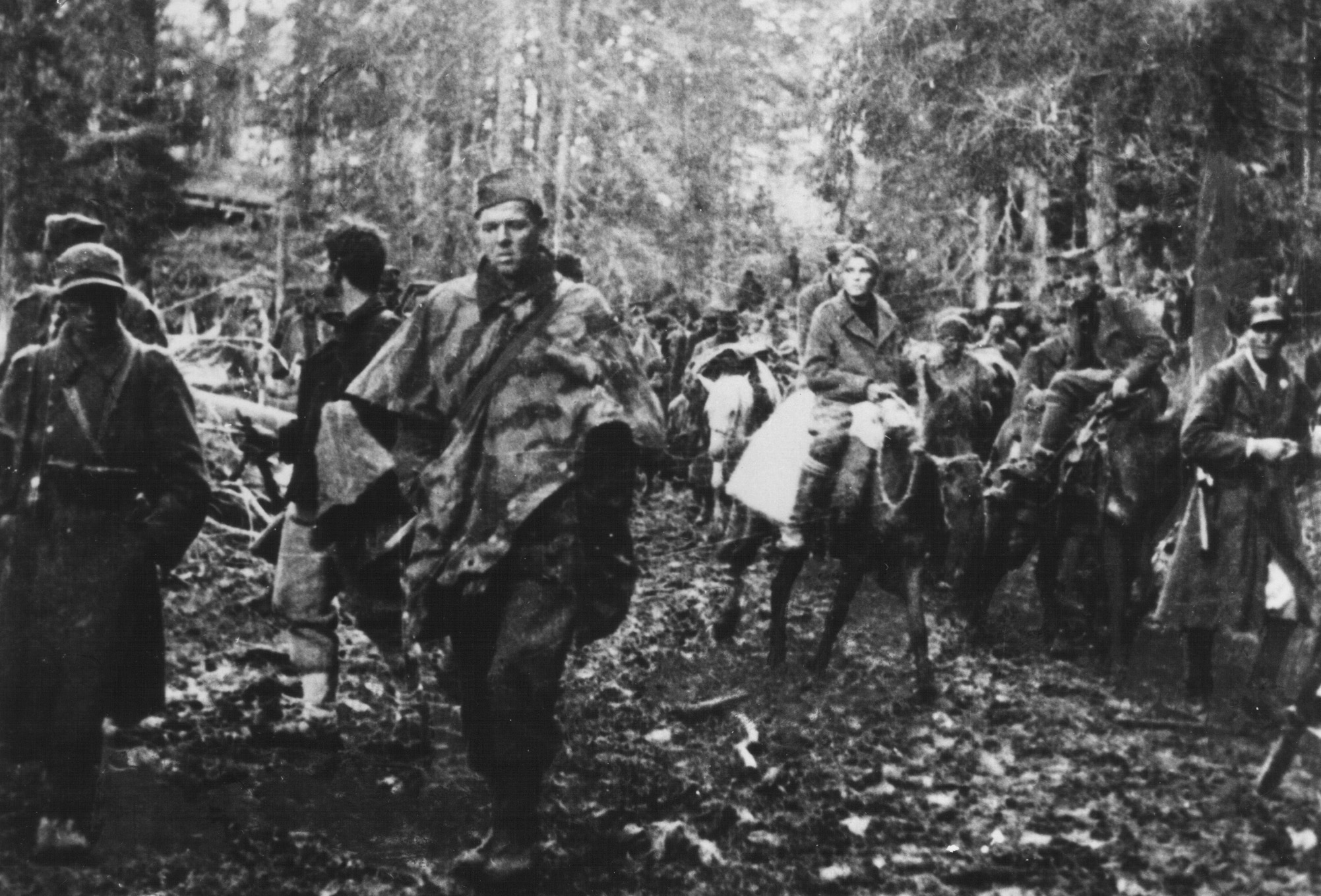 Srpskohrvatski / српскохрватски: Partizani na Sutjesci 1943. godine.